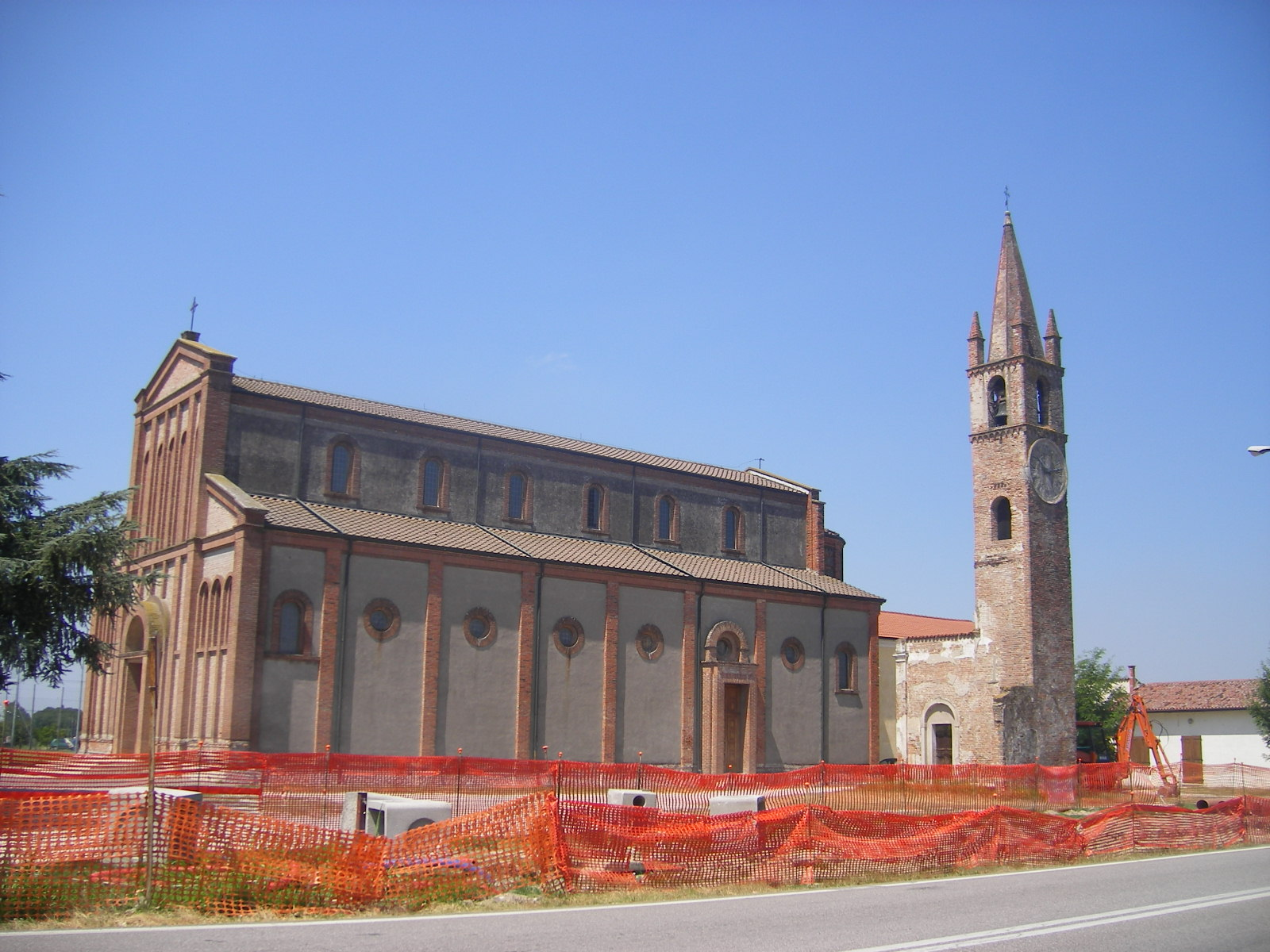 Bevilacqua